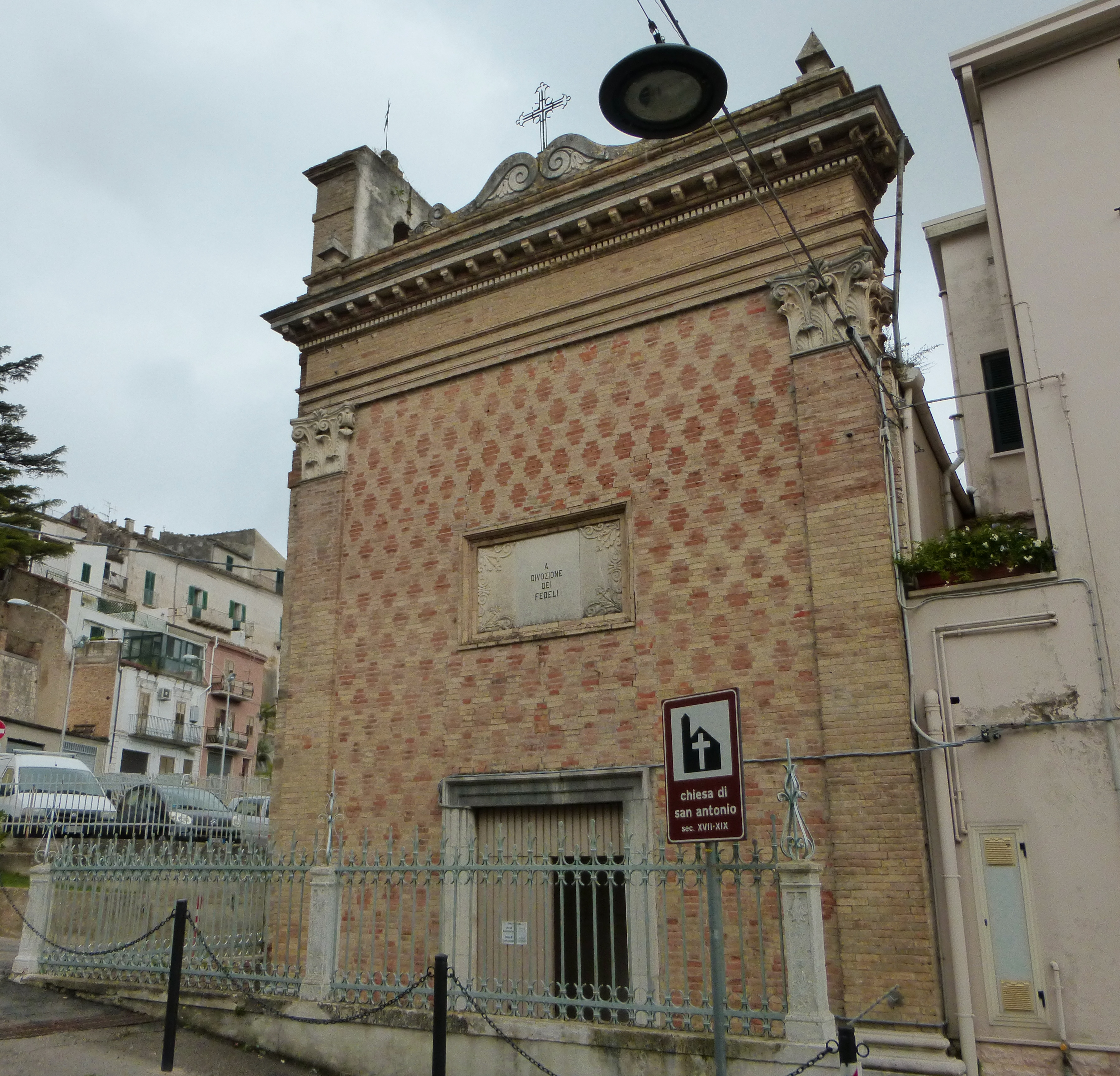 Facciata della chiesa di Sant'Antonio, Atessa, Chieti.